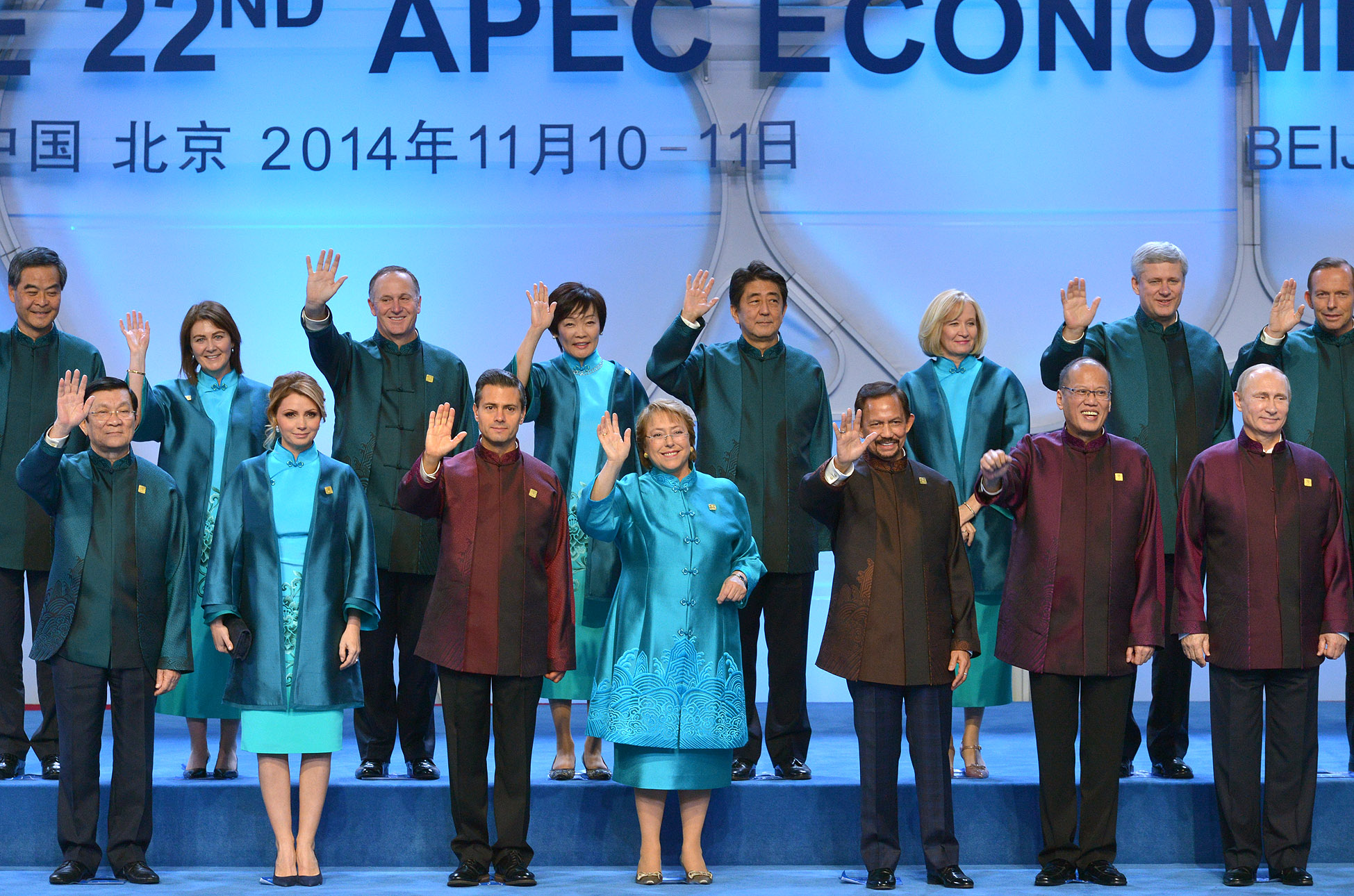 Gobierno de Chile